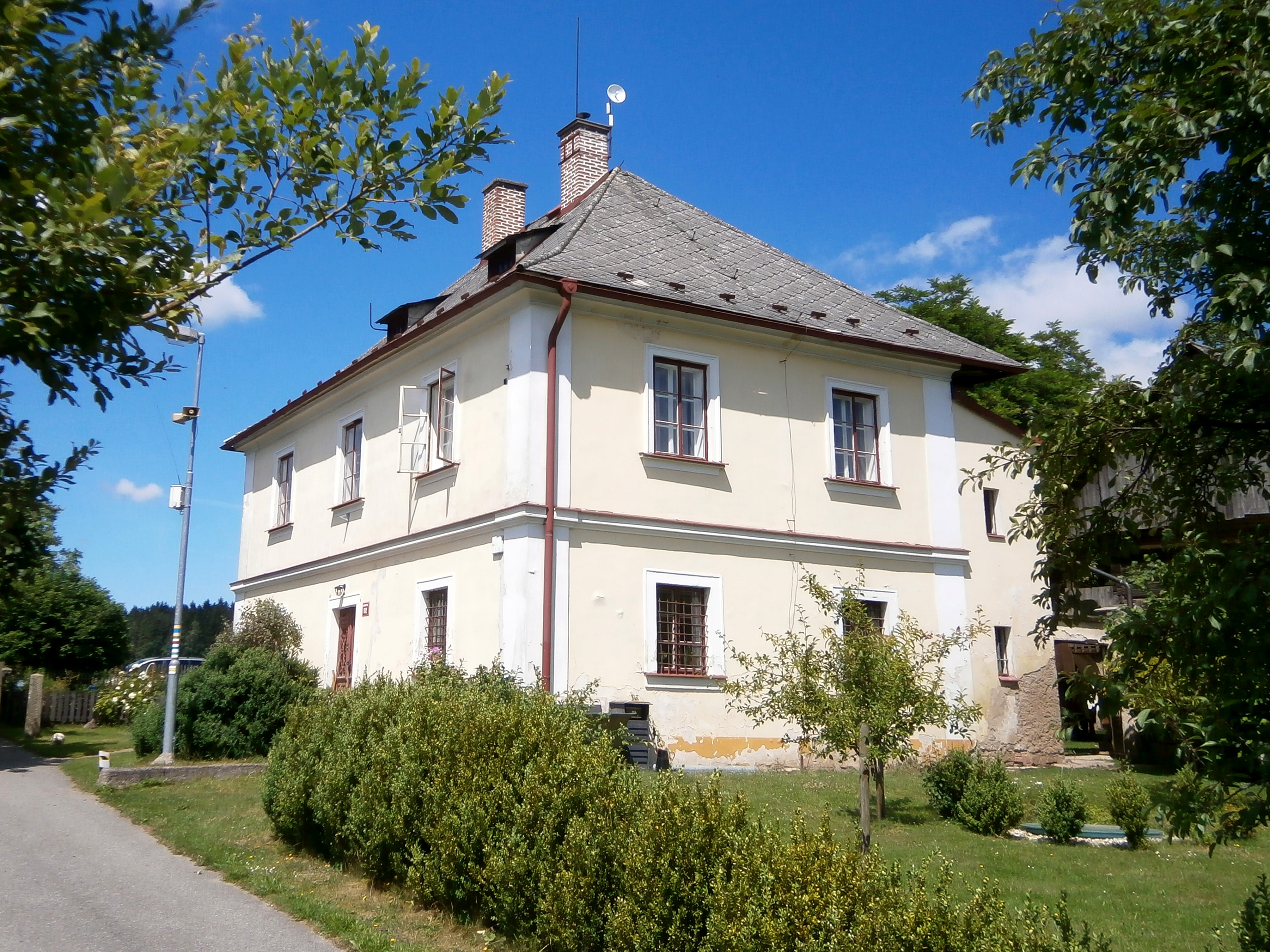 Fara (Boušín)